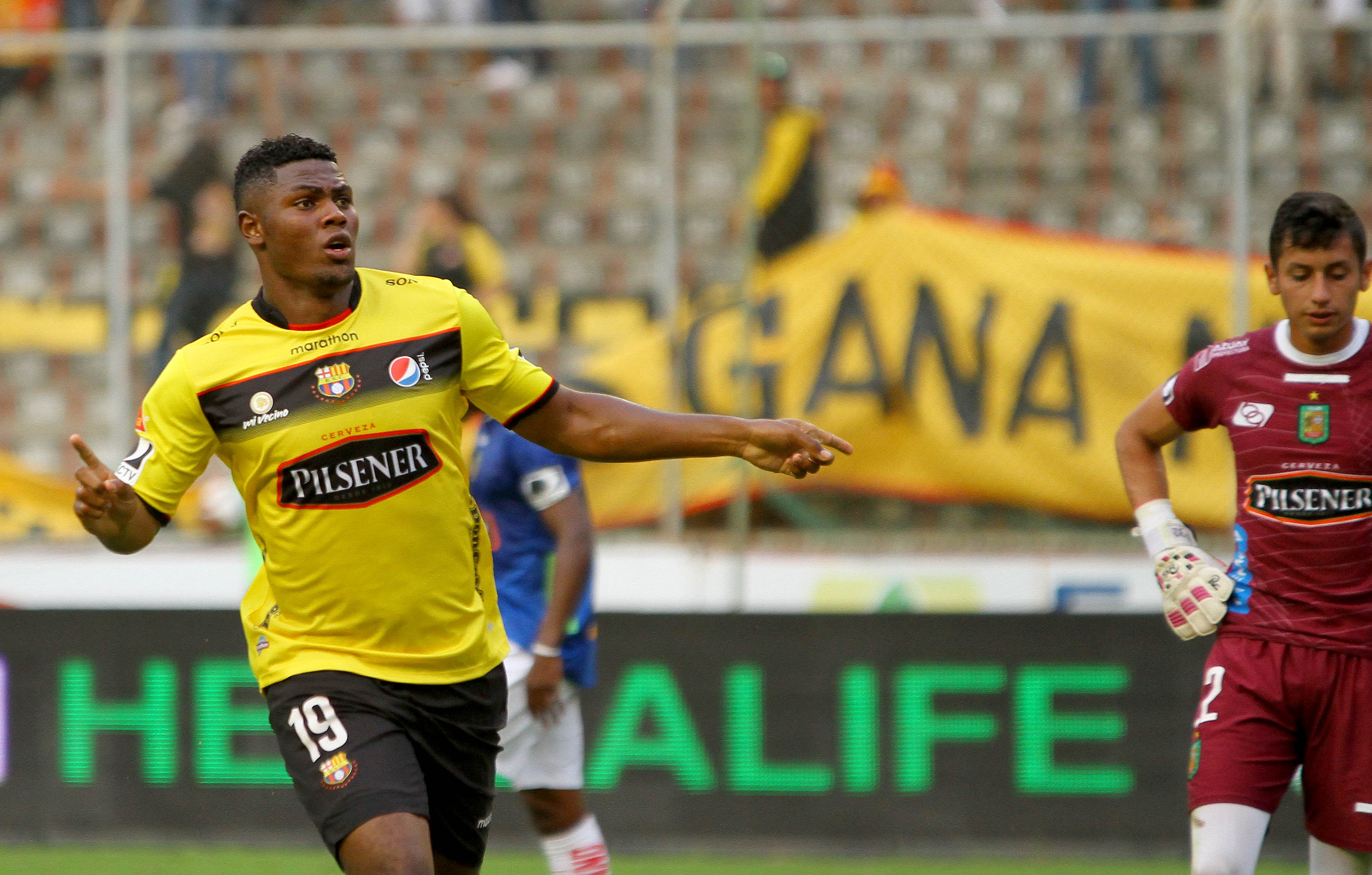 Guayaquil, domingo 15 de marzo del 2015 (ANDES).-Barcelona enfrenta al Deportivo Cuenca en la séptima fecha del Campeonato Nacional de Fútbol Foto.César Muñoz/ANDES